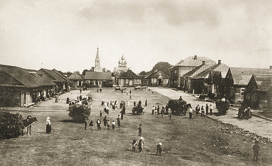 Беларуская (тарашкевіца): Любча (Lubča), пляц Рынак (plac Rynak)